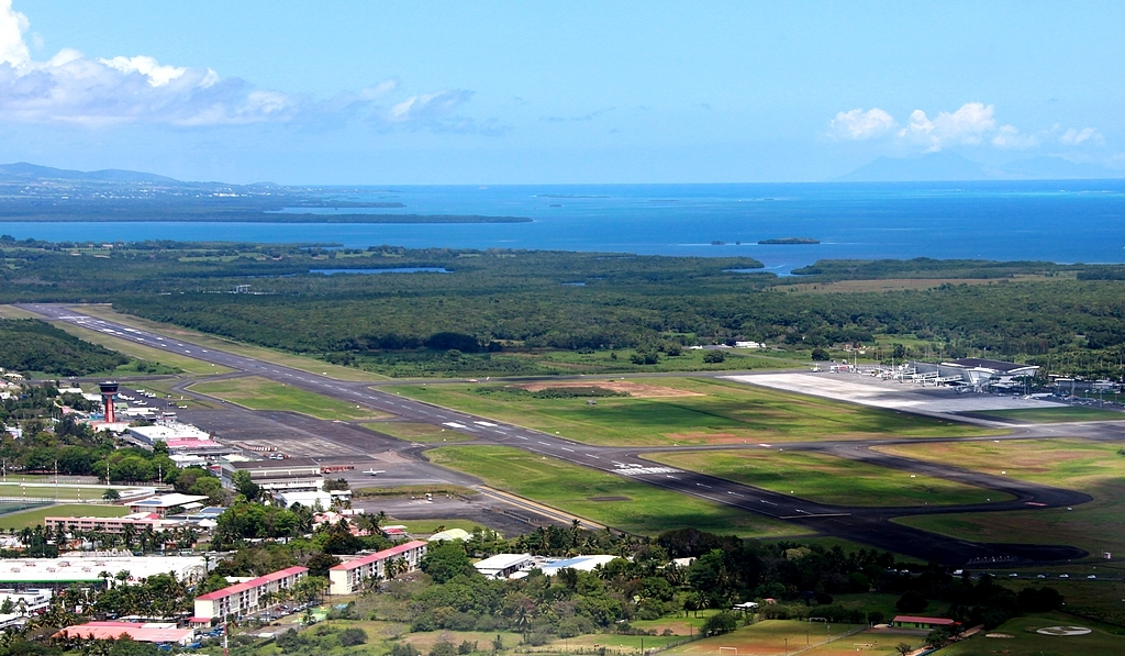 Pole caraibes.